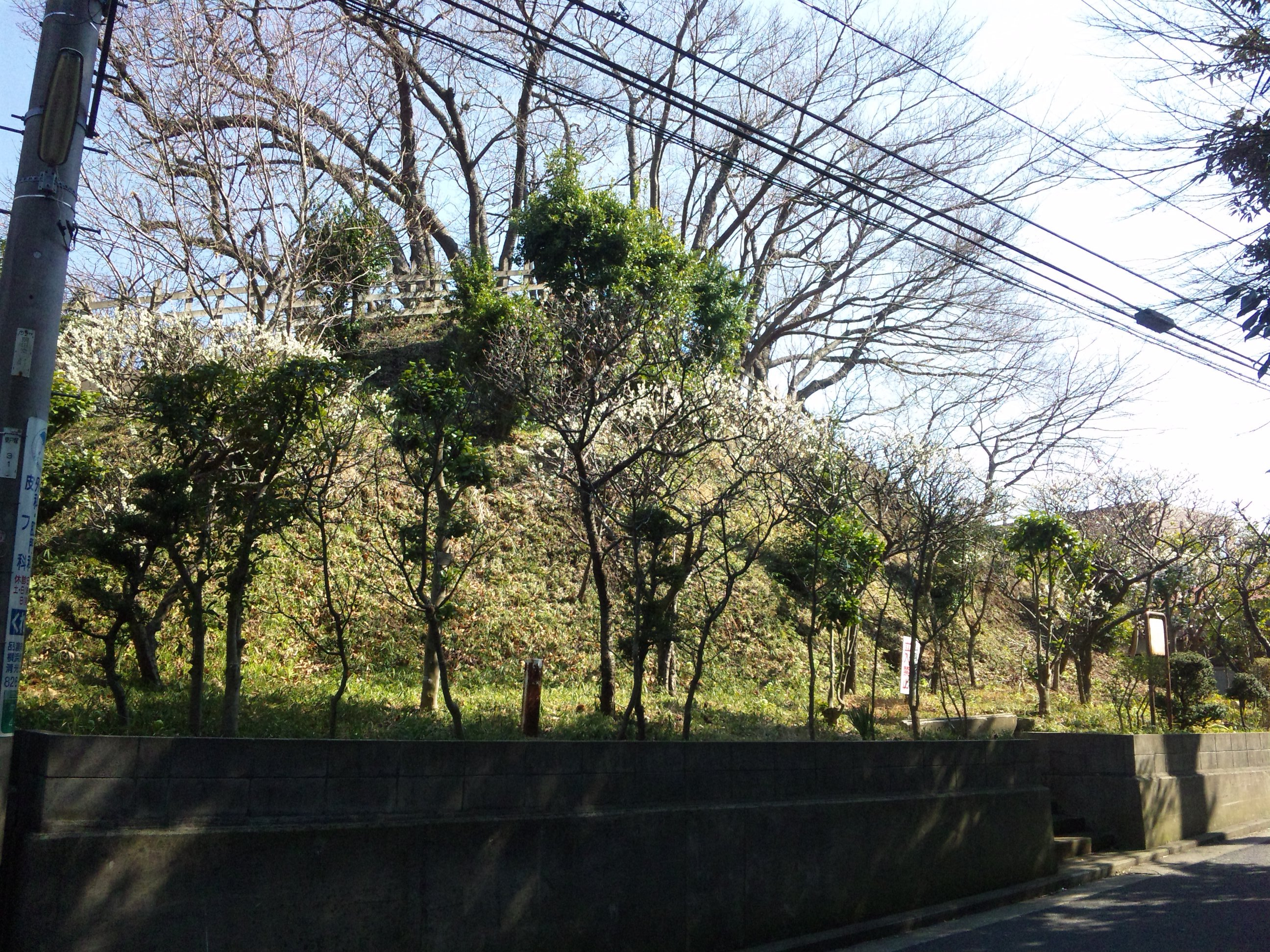 旧東海道 品濃一里塚 （横浜市戸塚区）